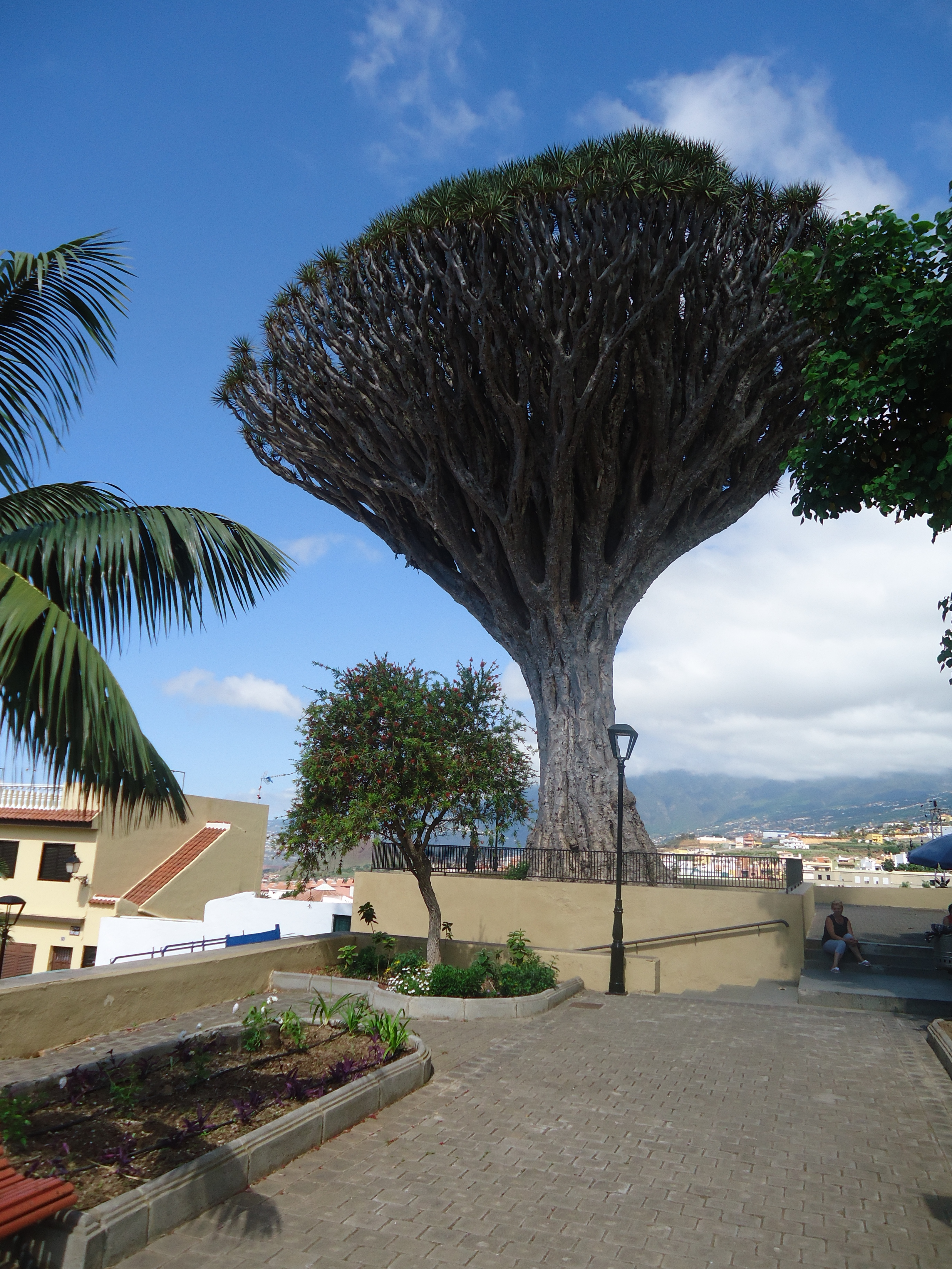 Drago monumental en la entrada del Cementerio de San Francisco, Los Realejos